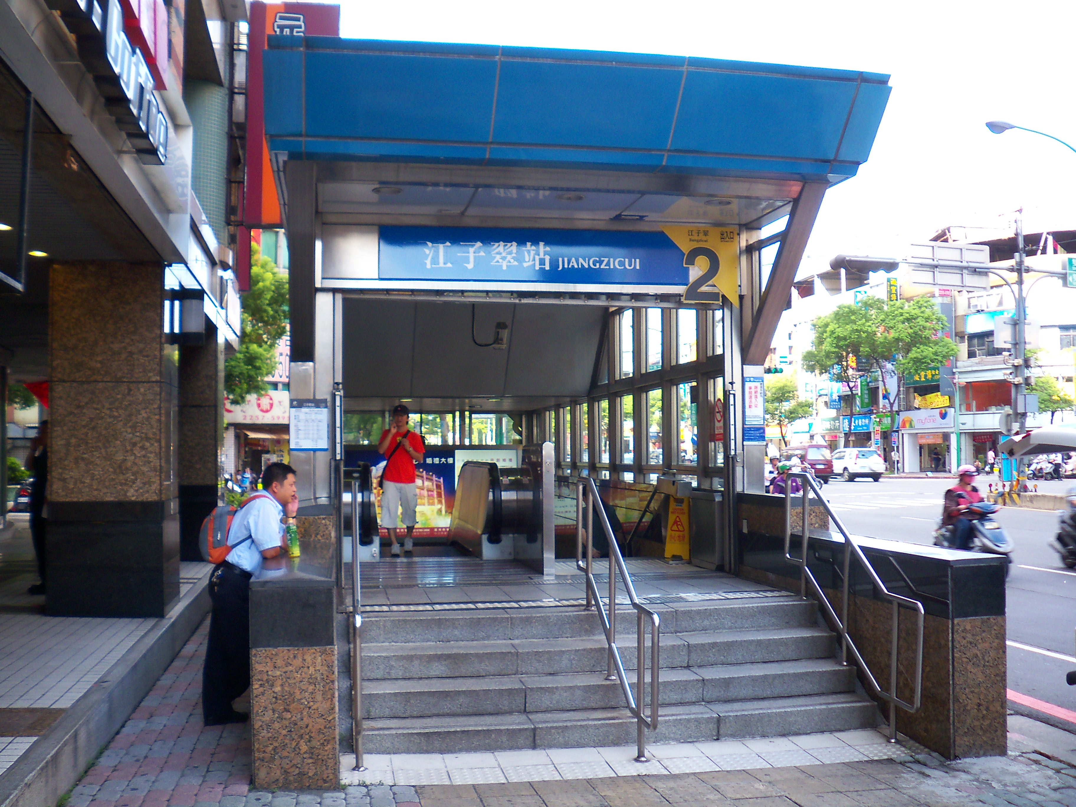 台北捷運板橋線江子翠駅2号出口。